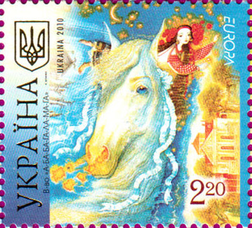 Поштові марки серії Дитячі книги, 2010